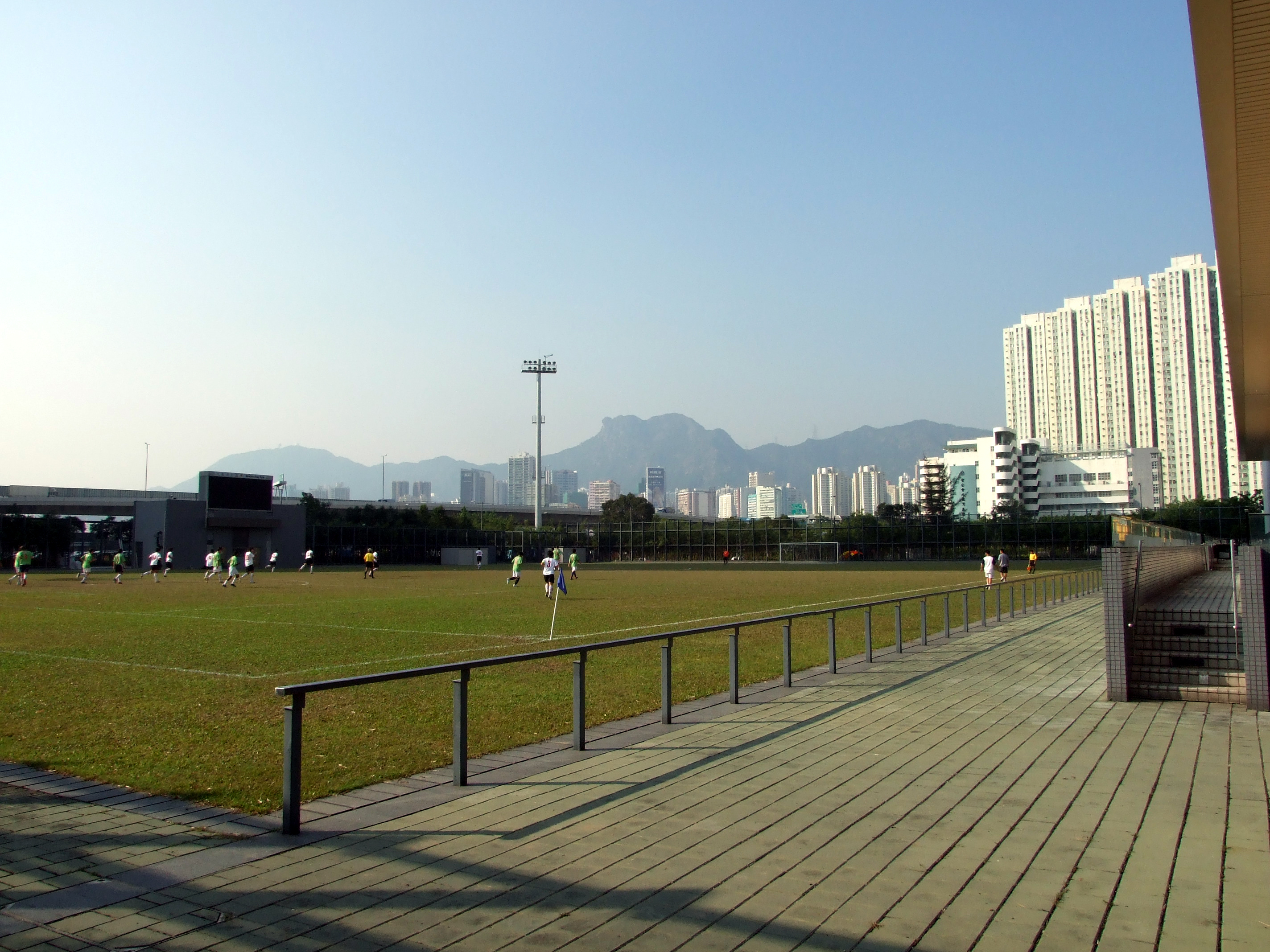 中文（香港）: 九龍灣公園天然草地球場